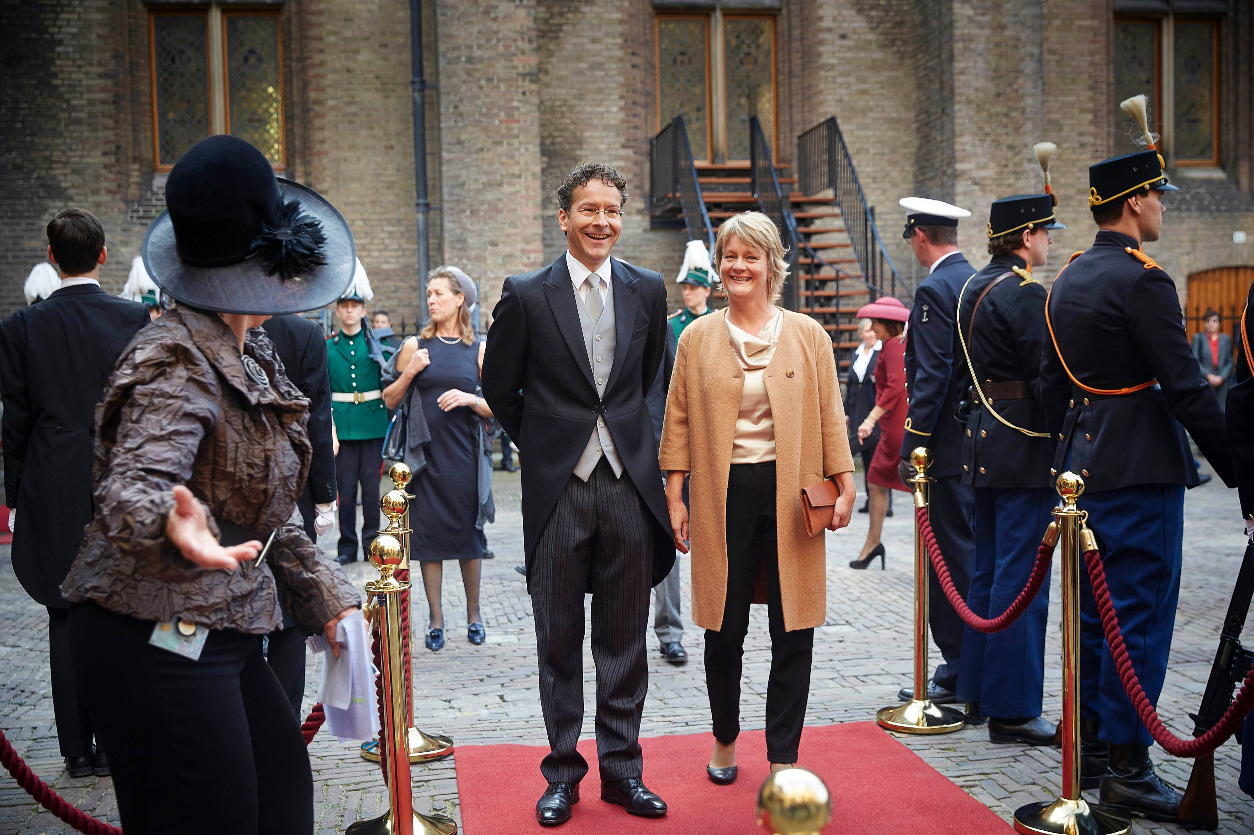 Jeroen Dijsselbloem op Prinsjesdag 2014